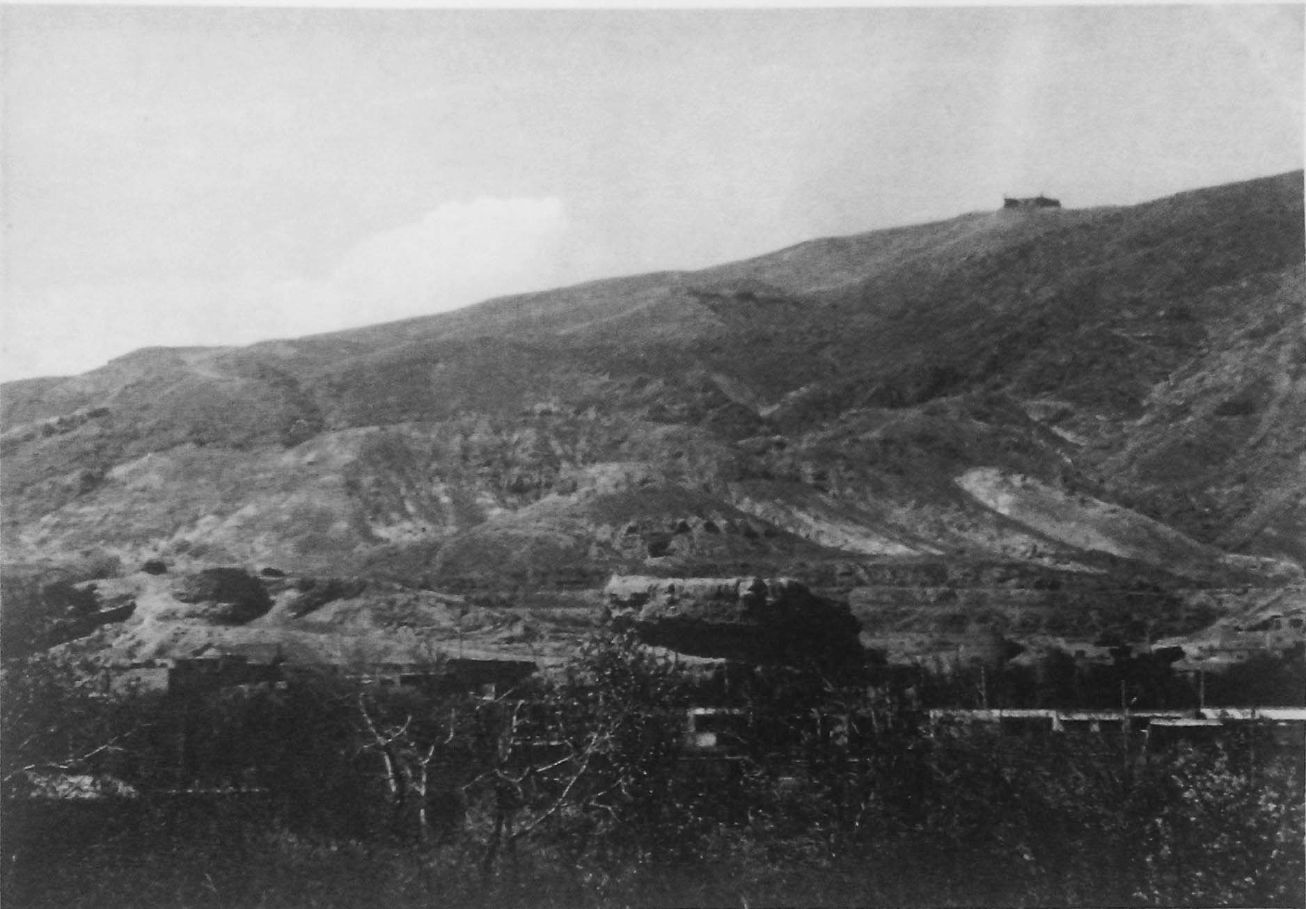 ربع رشیدی